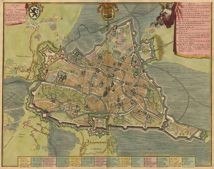 Plan de la Ville et Citadelle de Gand . . . - Fricx E. ,1712. From: Table des cartes des Pays Bas et des Frontières de France, Avec un recueil des plans des villes, sièges et battailles données entre les Hauts Alliés et la France. Bruxelles, H. Fricx, 1712.